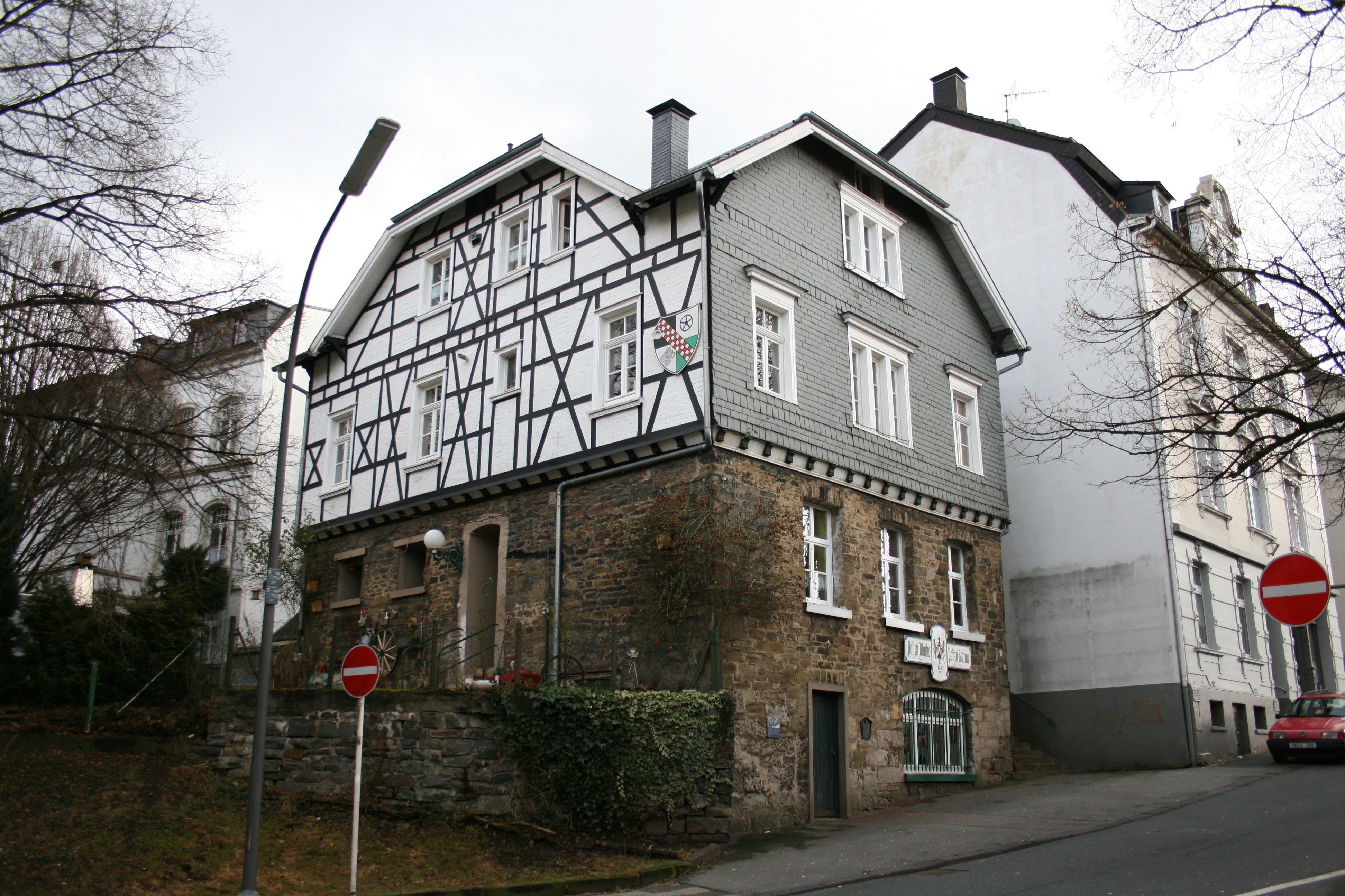 Alte Wache in Wuppertal-Langerfeld